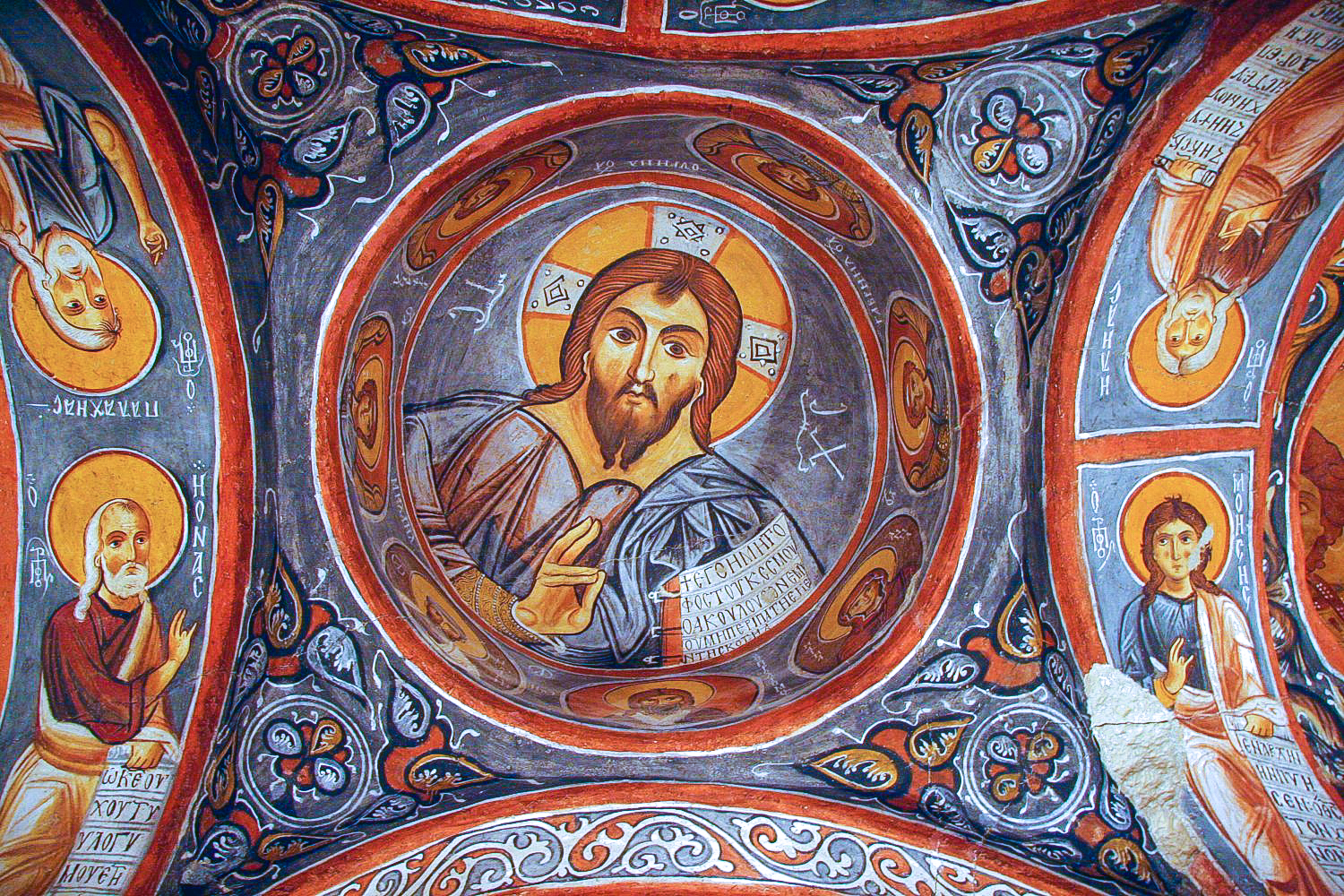 Beschreibung: Göreme Open Air Museum - Dunkle Kirche; Kuppelbild Christus Pantokrator; die Buchseite zeigt den griech. Wortlaut von Joh 8,12: "Ich bin das Licht der Welt. Wer mir nachfolgt, wird nicht in der Finsternis umhergehen". Quelle: selbst fotografiert Datum: November 2004 Fotograf: Karsten Dörre (Benutzer:grizurgbg)